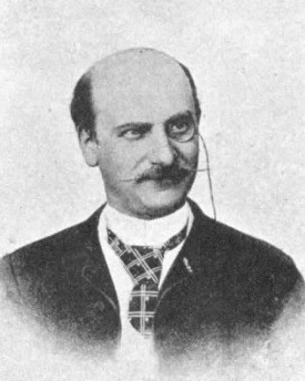 "Edmond Lepelletier, rédacteur à L’Écho de Paris, conseiller municipal de la ville de Paris, romancier et auteur dramatique."